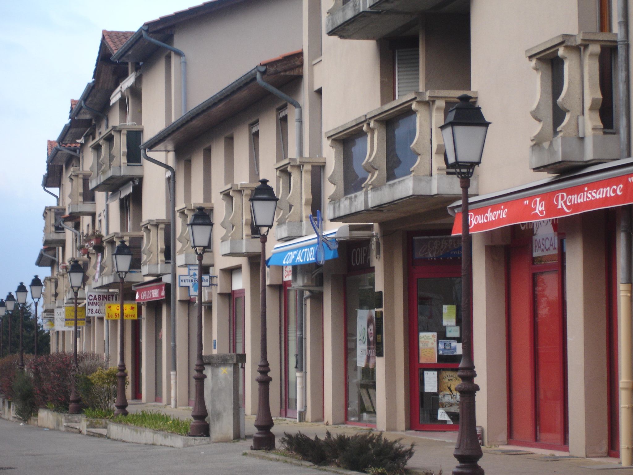 Saint-Pierre de Chandieu (69) : Le clos du centre